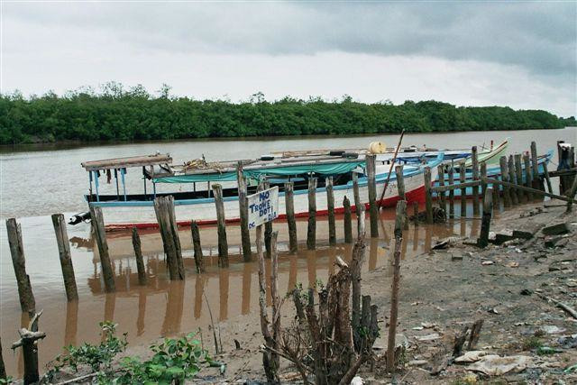 prive foto